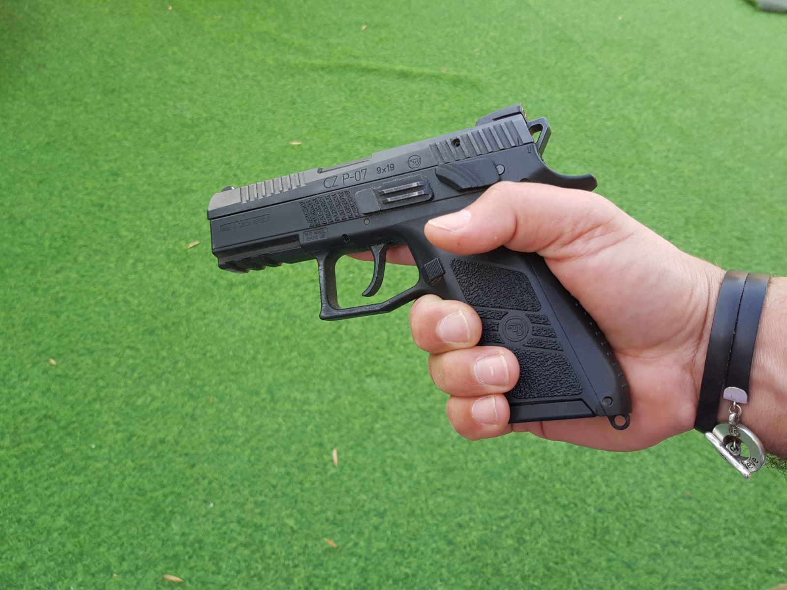 אקדח מסוג cz p-07